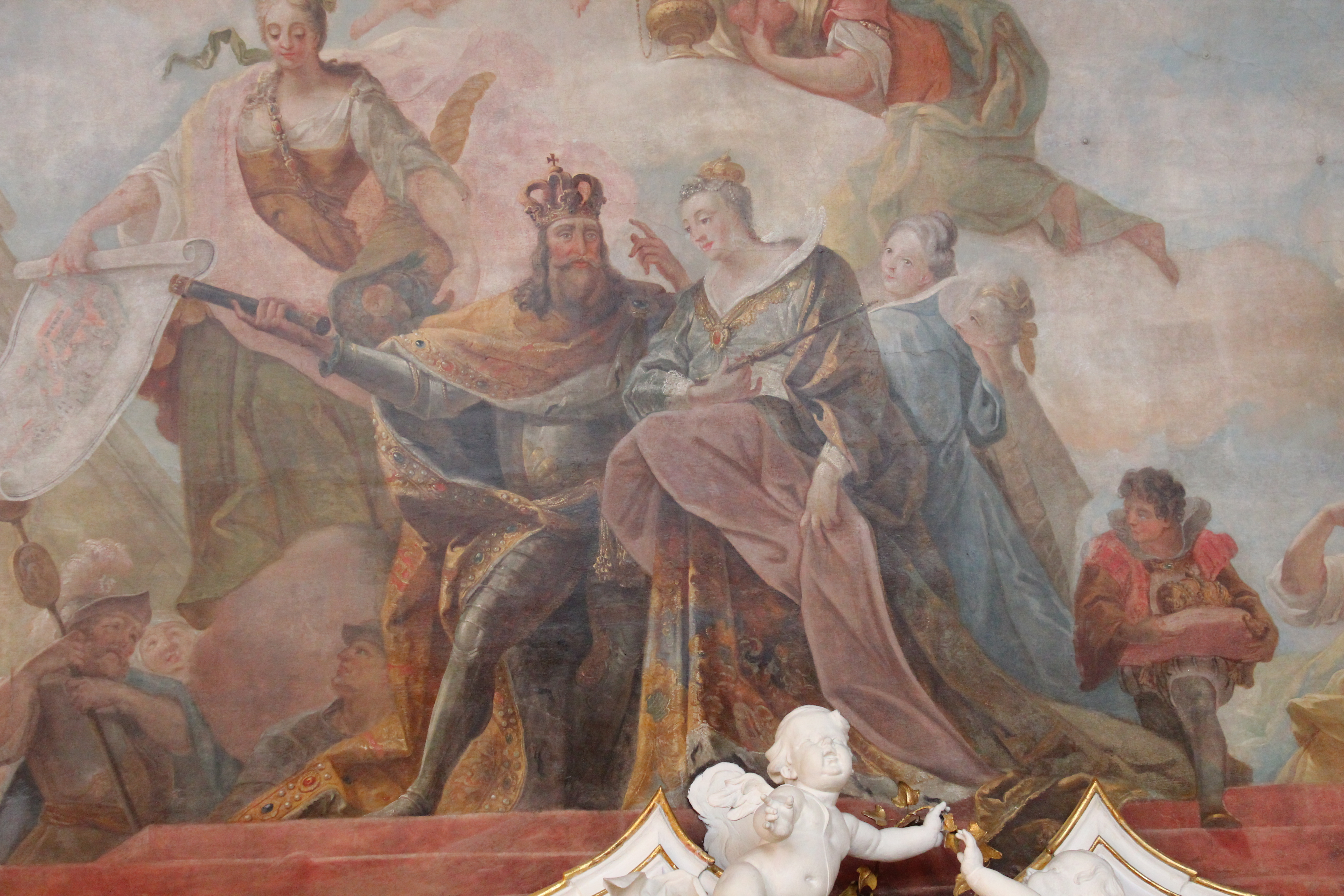 Residenz Kempten, näheres siehe Dateiname